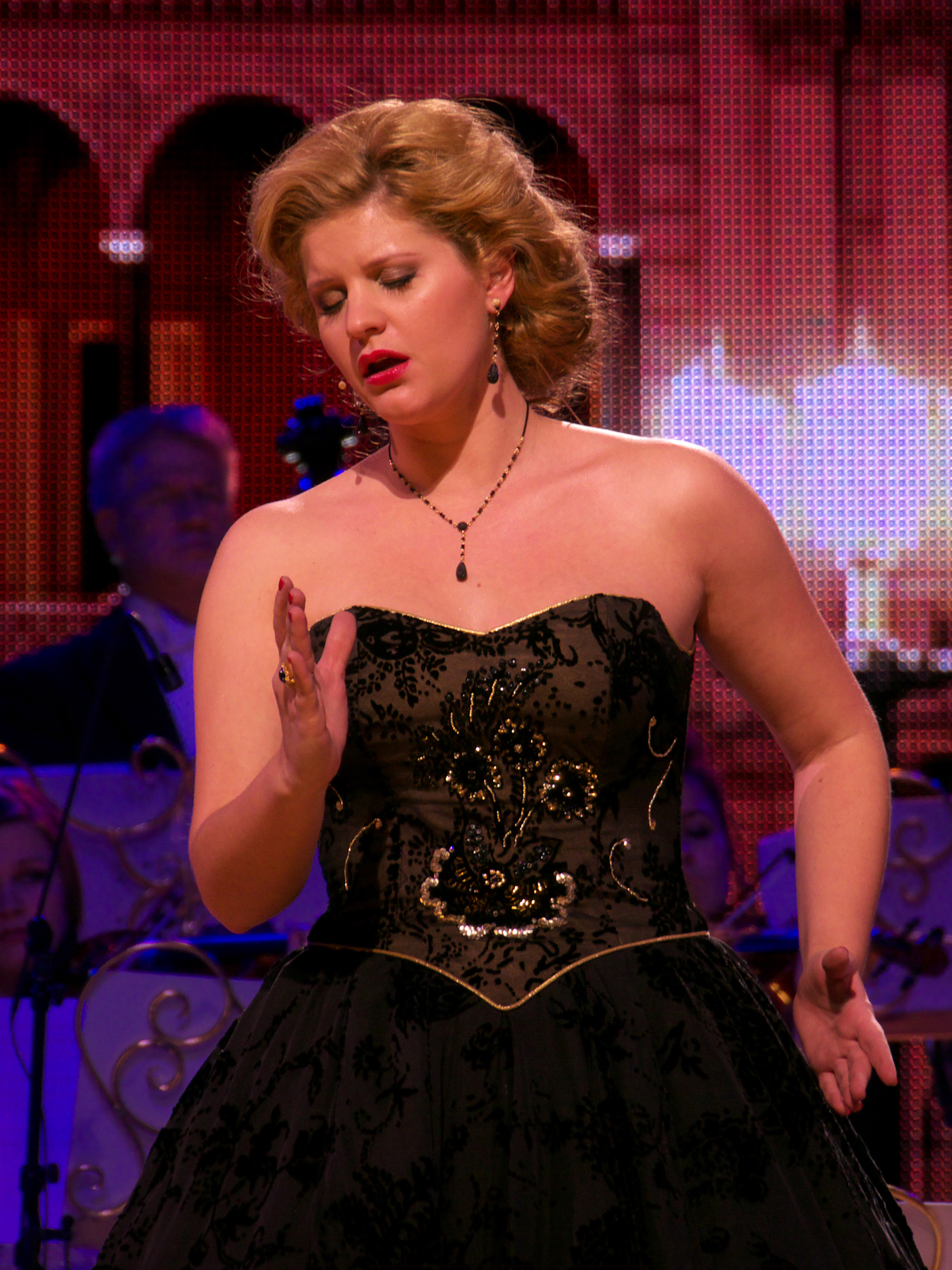 Mirusia Louwerse beim Konzert von Andre Rieu am 02.01.2011 in Köln